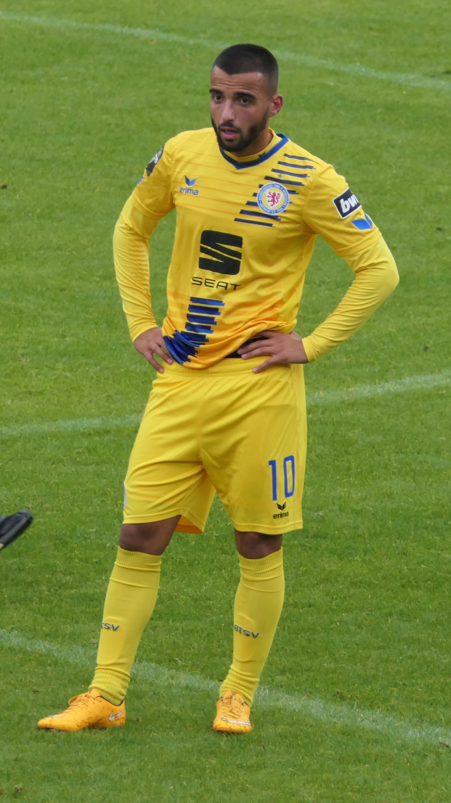 Der Fussballprofi Mergim Fejzullahu im Trikot von Eintracht Braunschweig beim Auswärtsspiel bei der SpVgg Unterhaching am 01.09.2018.